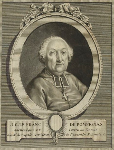 J G Le Franc de Pompignan (1715-1790)